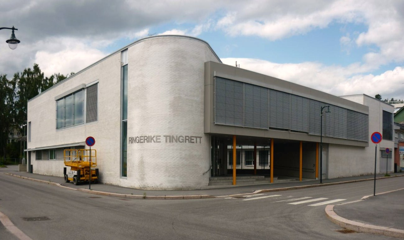 Tinghuset i Hønefoss